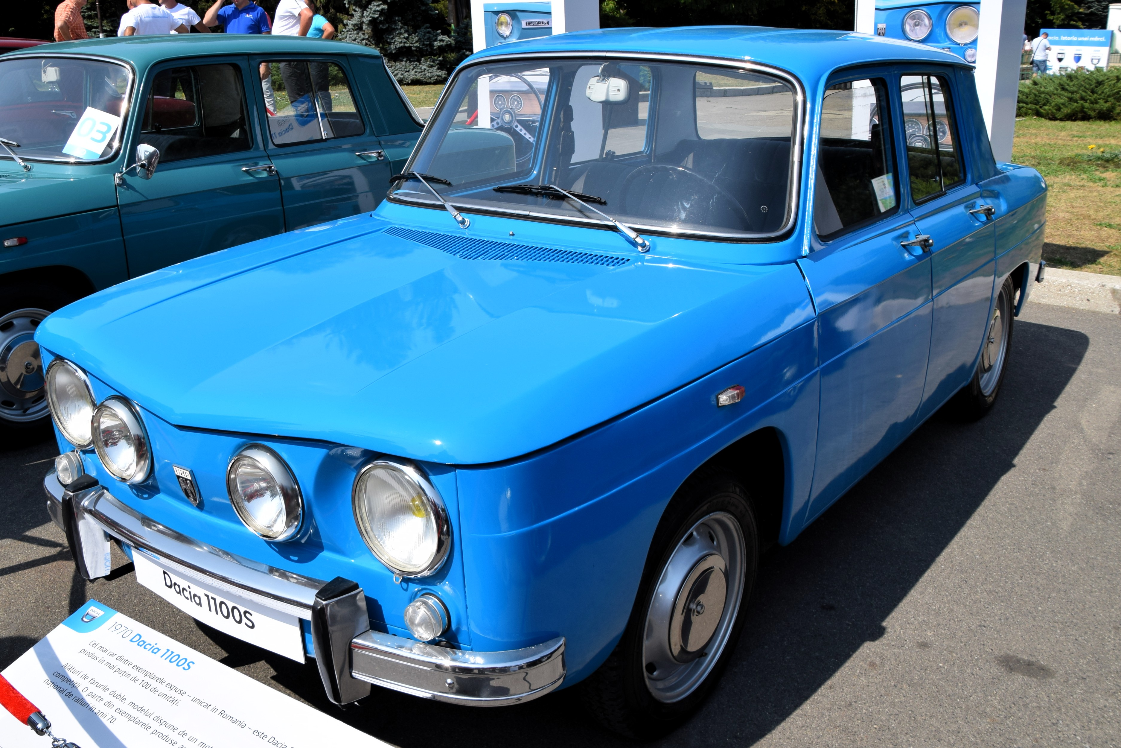 Dacia 1100S expusă în Parcul Herăstrău la aniversarea a 50 de ani de la apariția mărcii Dacia.